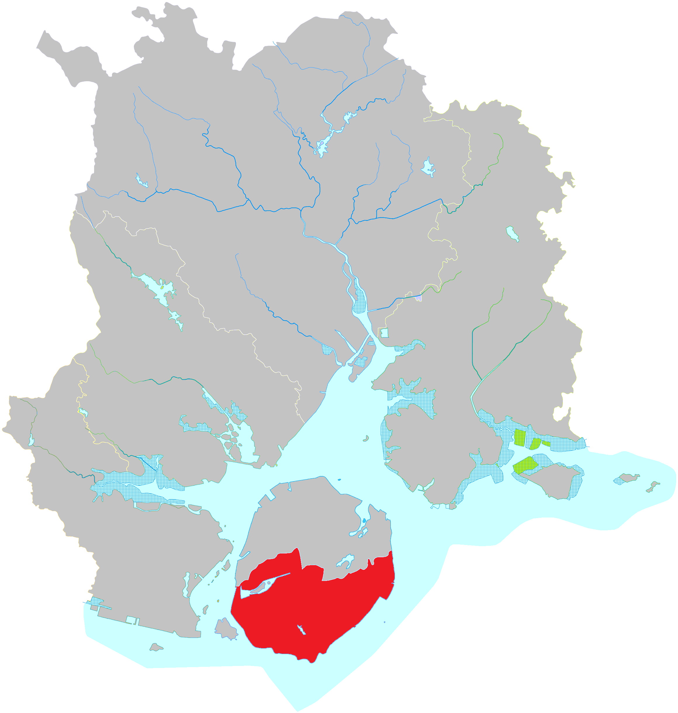 Siming, Xiamen-China mapa